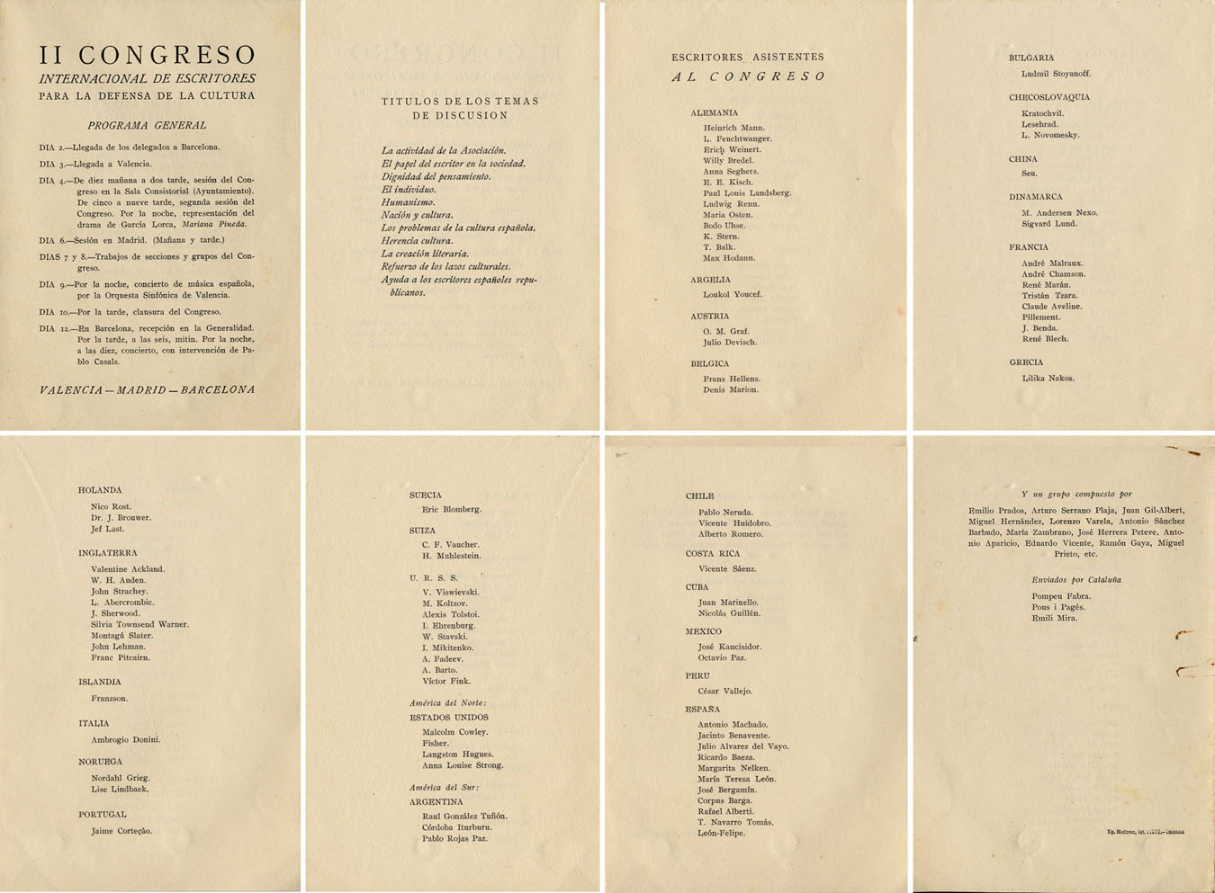 Programa del II Congreso internacional de escritores para la defensa de la cultura. Valencia - Madrid - Barcelona. 1937.